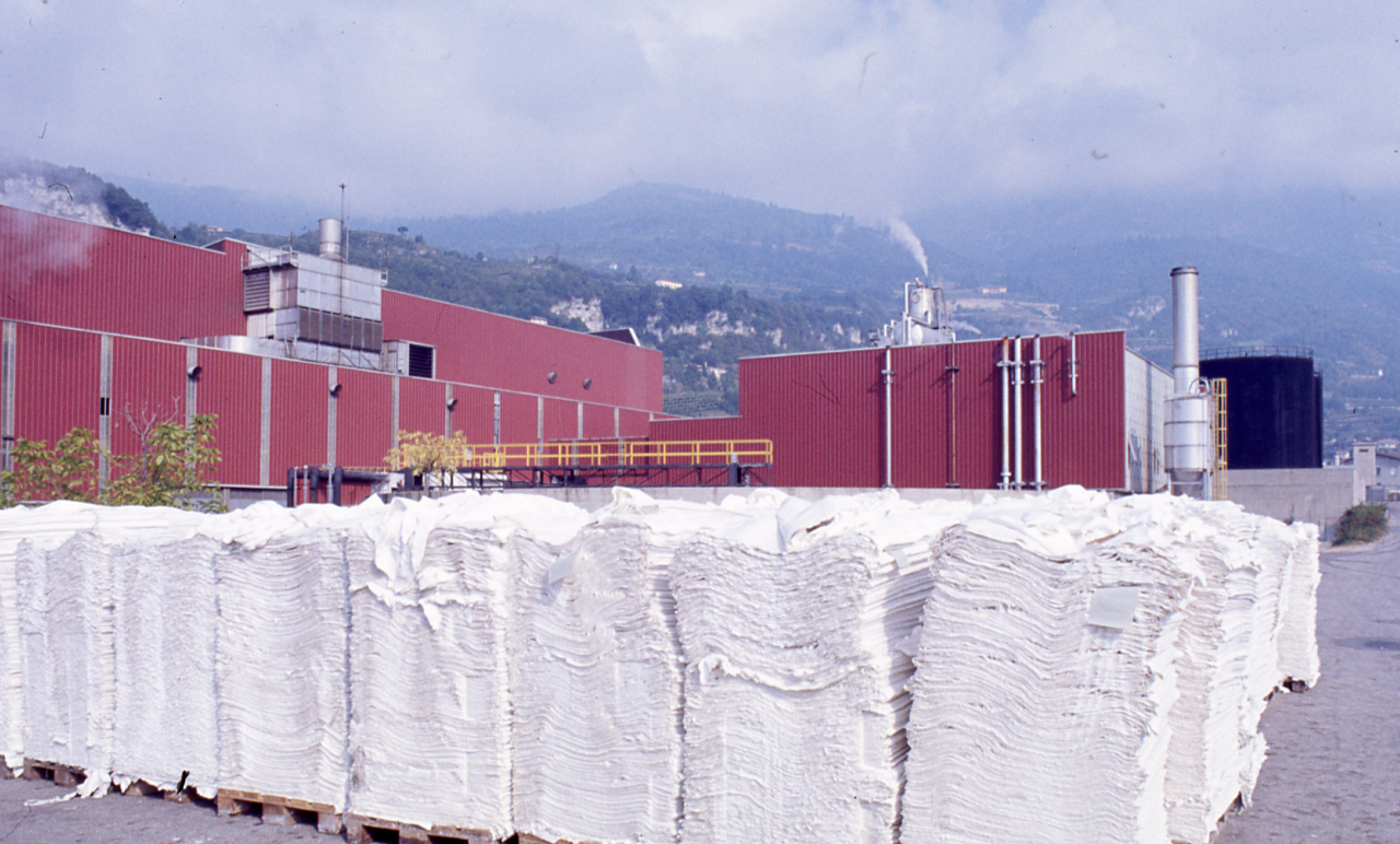 Servizio fotografico : Villa Lagarina, 1980 / Paolo Monti. - Foglio: 1, Fotogrammi complessivi: 12/20 : Diapositiva, sviluppo cromogeno/ pellicola ; 35 mm. - ((Confronti con negativi (b/n - gelatina bromuro d'argento/ pellicola - 35mm). - Le diapositive nn. 13-20 costituiscono un'altra serie. - Occasione: Documentazione dello stabilimento di Val Lagarina (su ordinazione del Signor Ricci). - Fonte: Rubrica di Paolo Monti: Diapositive 24x36mm (1948-1982), presso Archivio Paolo Monti. Rubrica con elenco soggetti e numeri di inventario (da 1 a 1000) corrispondenti ai fogli a tasche in pvc in cui sono contenute le diapositive. - Fonte: Fattura di Paolo Monti: IV. Commesse/ Fattura n. 02/ Fotografie stabilimento di Val Lagarina (1978/01/25), presso Archivio Paolo Monti. N. 20 fotografie a colori e 5 foto in b/n scelte da 60 a colori e 40 in b/n. [...] Spese soggiorno per 2 giorni.